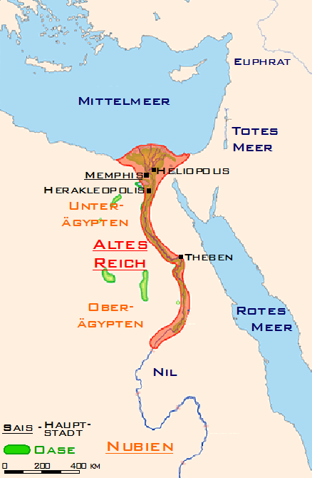 Ausdehnung des altes ägytischen Reiches (Altes Reich)